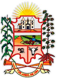 Escudo del municipio Bruzual (Anzoátegui)